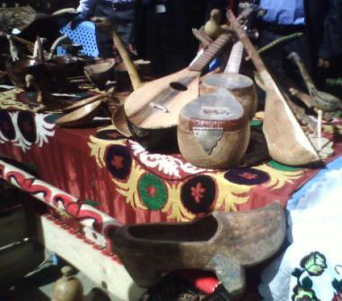 Деревяные ходули и национальные музыкальные инструменты из Таджикабадского района, Таджикистан